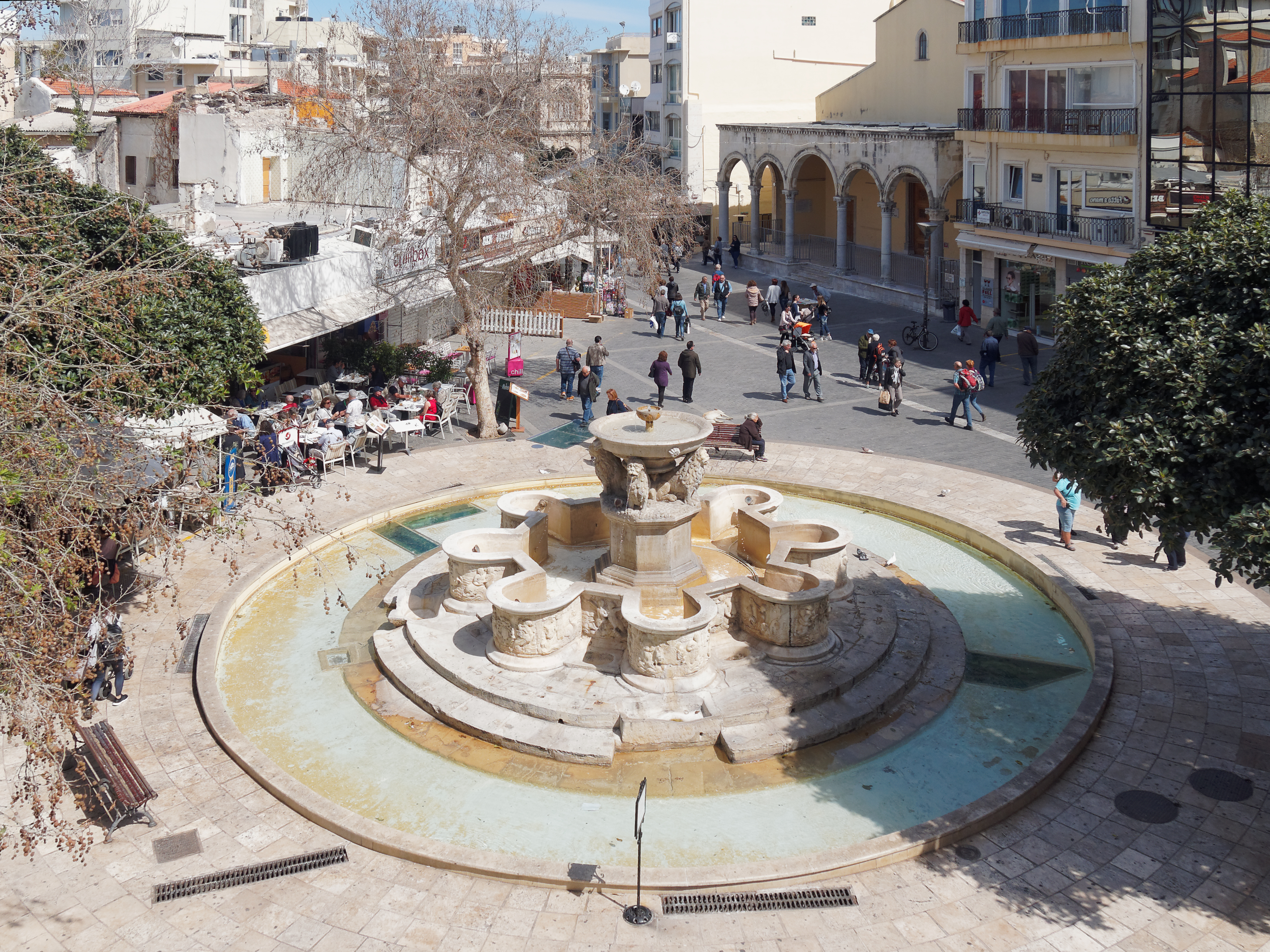 Κρήνη Μοροζίνι«Κρήνη Μοροζίνι»